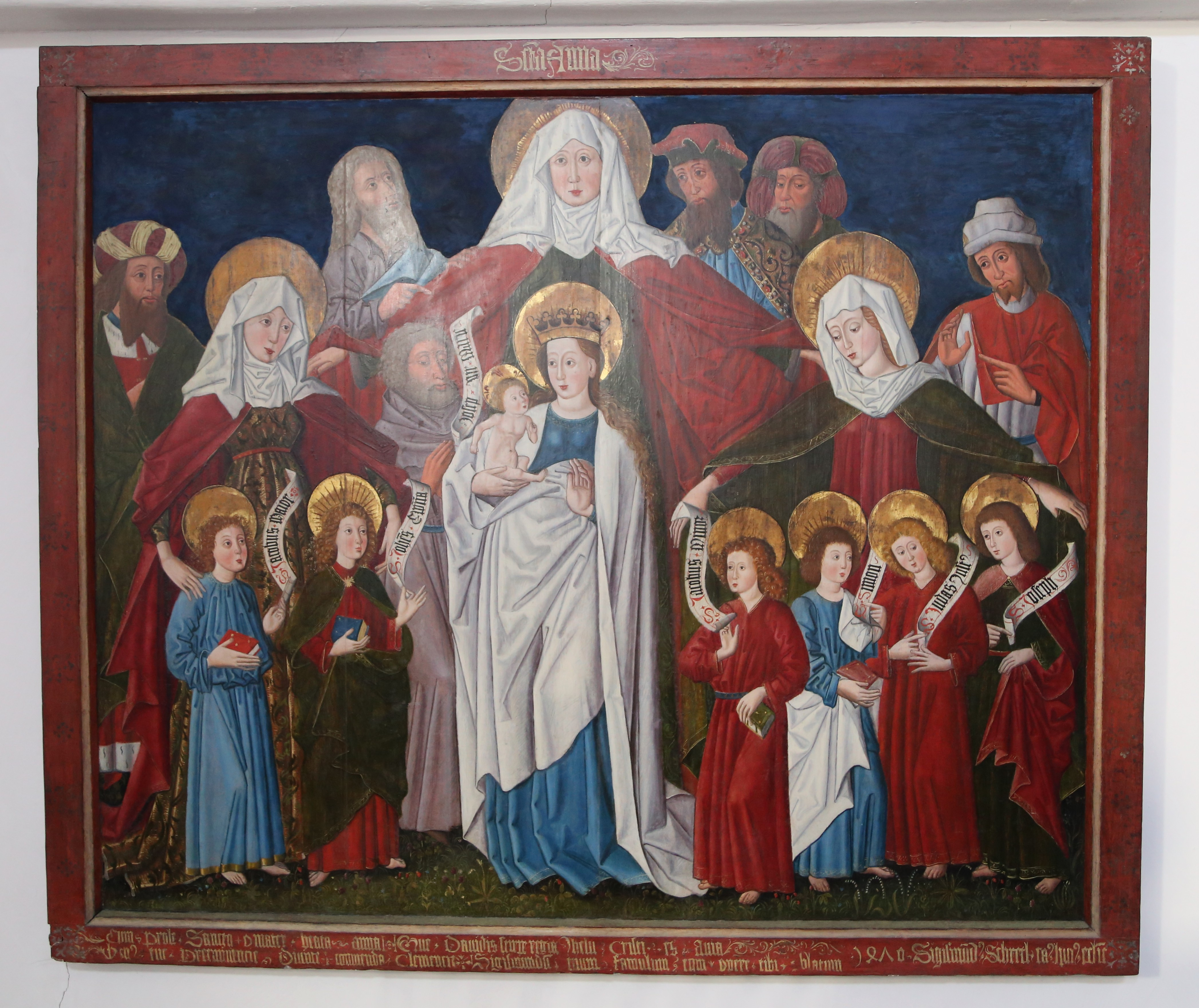 Schloßplatz 2, Tegernsee;Ehemalige Klosterkirche St. Quirin, jetzt katholische Pfarrkirche, dreischiffige Pfeilerbasilika mit Querhaus, Seitenkapellen, mittelschiffbreitem langen Chor und westlicher Doppelturmfassade, Türme und Krypta im Kern 11. Jahrhundert, Psallierchor und dreischiffiges Langhaus 15. Jahrhundert, ab 1678 Barockisierung und Einfügung von Vierung und Querhaus nach Plan von Enrico Zuccalli, um 1820 Abtrennung des östlichen Psallierchores und Umgestaltung der Fassade durch Leo von Klenze; mit Ausstattung